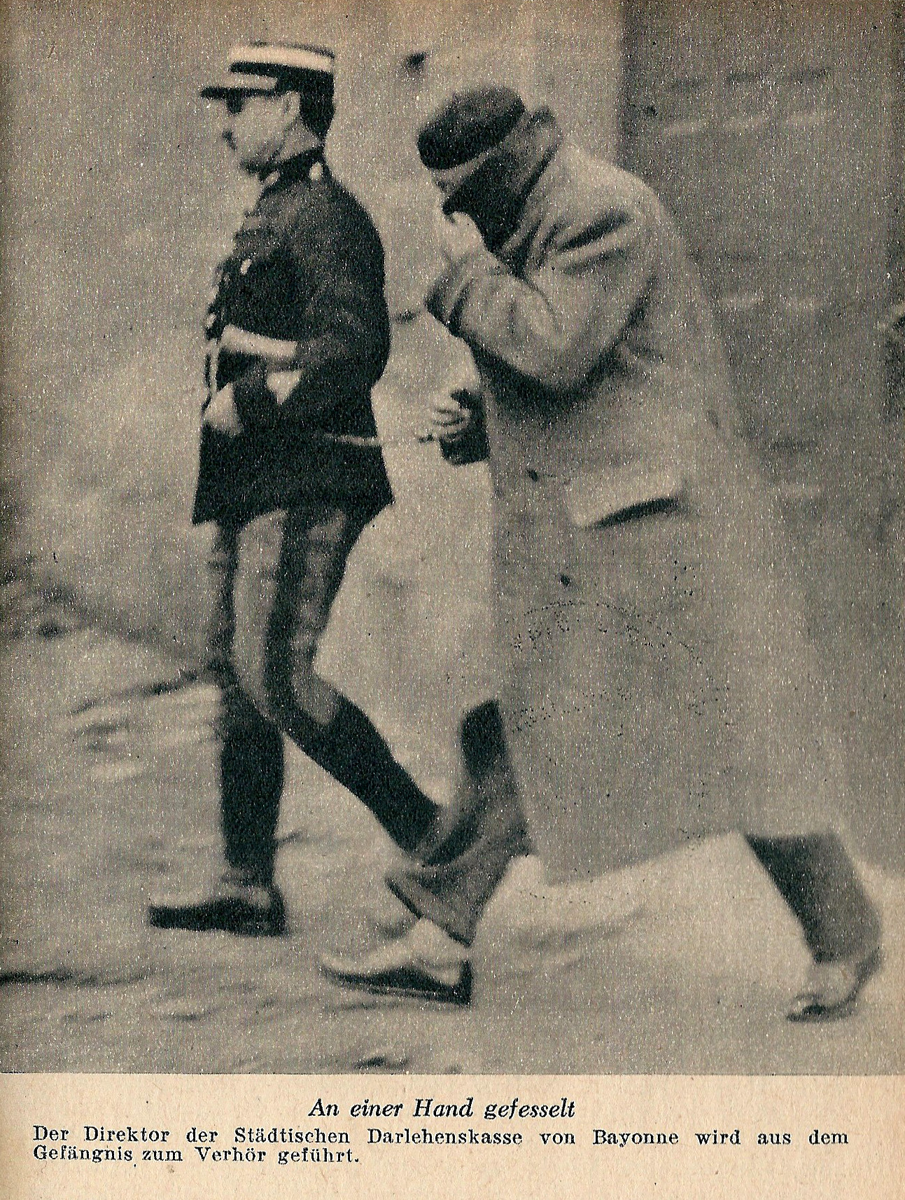 Image relative à l'Affaire Stavisky. Note importante : les légendes en allemand sont celles d'un document de propagande nazi.